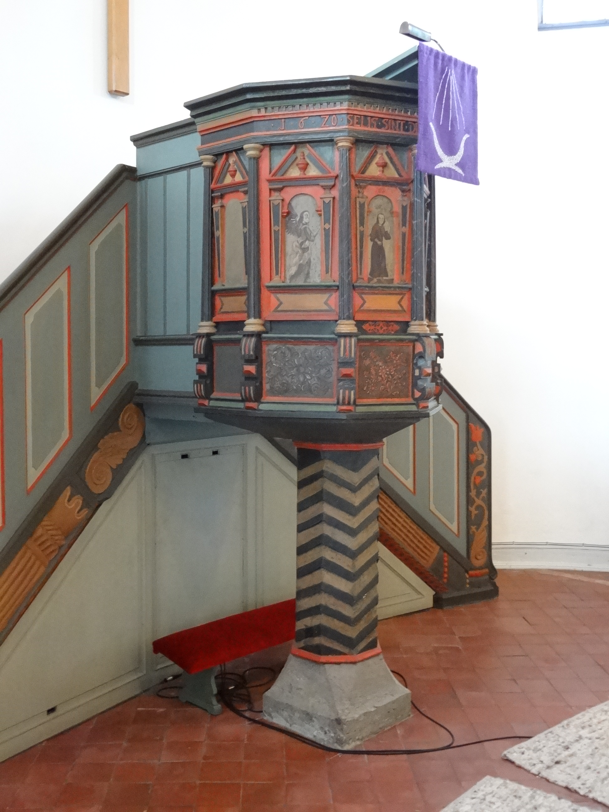 Evangelische Kirche Hochelheim